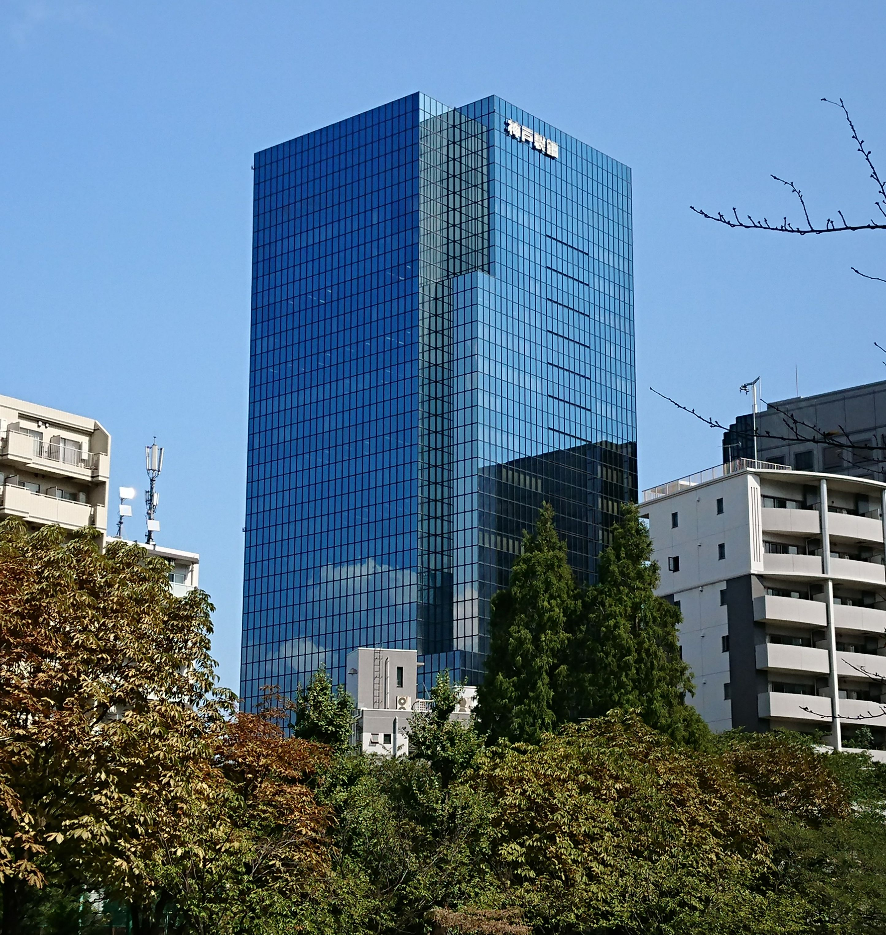 神戸製鋼所東京本社